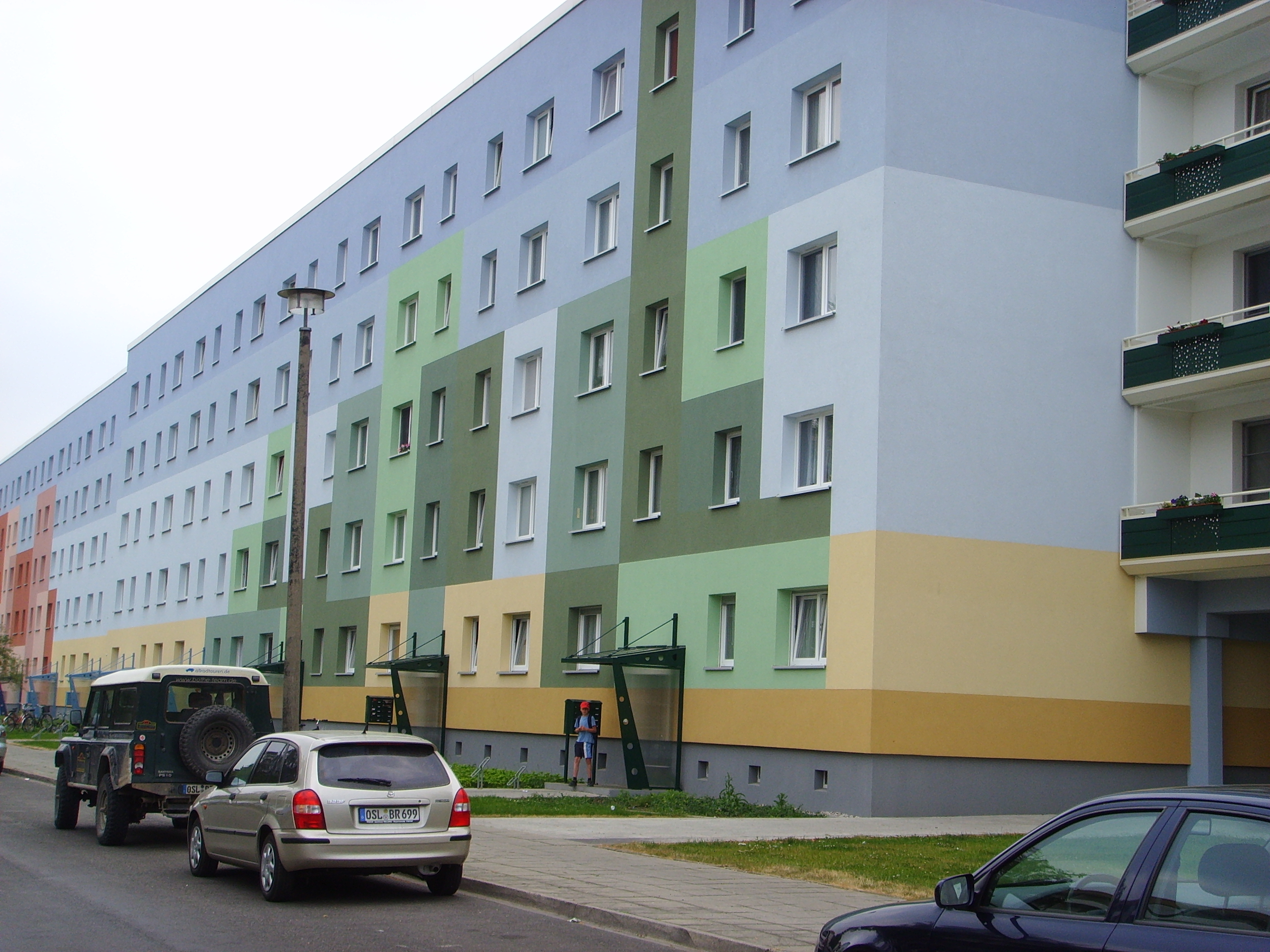 Rekonstruierte Plattenbauten in der Glück-Auf-Straße Senftenberg